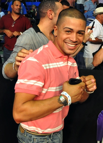 Wilfredo Vázquez Jr en la pelea de Juan Manuel López vs Oliver